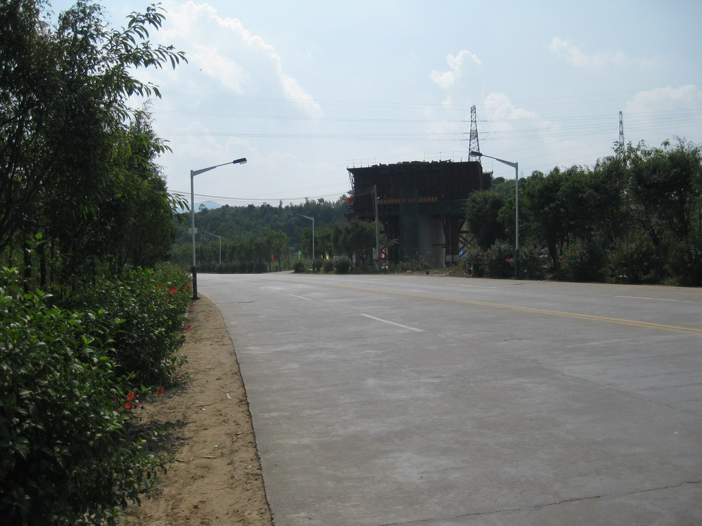 X532杜阮段